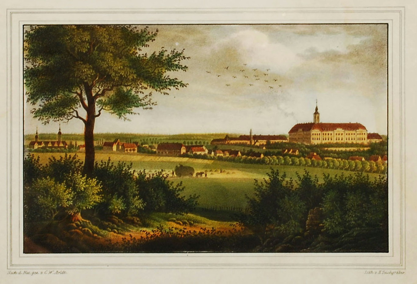 Schloss Hubertusburg und Wermsdorf (Germany/Sachsen) um 1840 Lithographie (12 x 19,5 cm) von Heinrich Wilhelm Teichgräber.